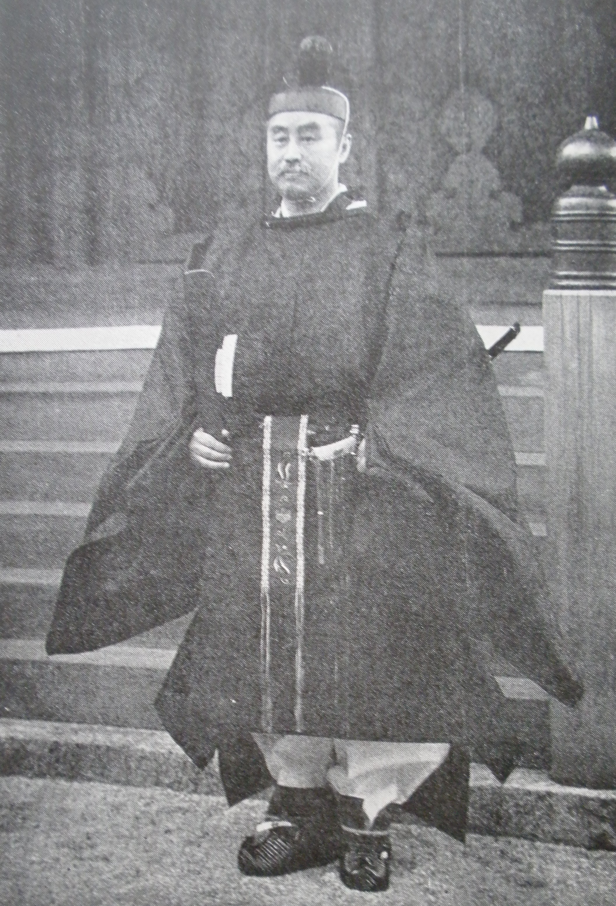 大礼使長官・公爵鷹司凞通